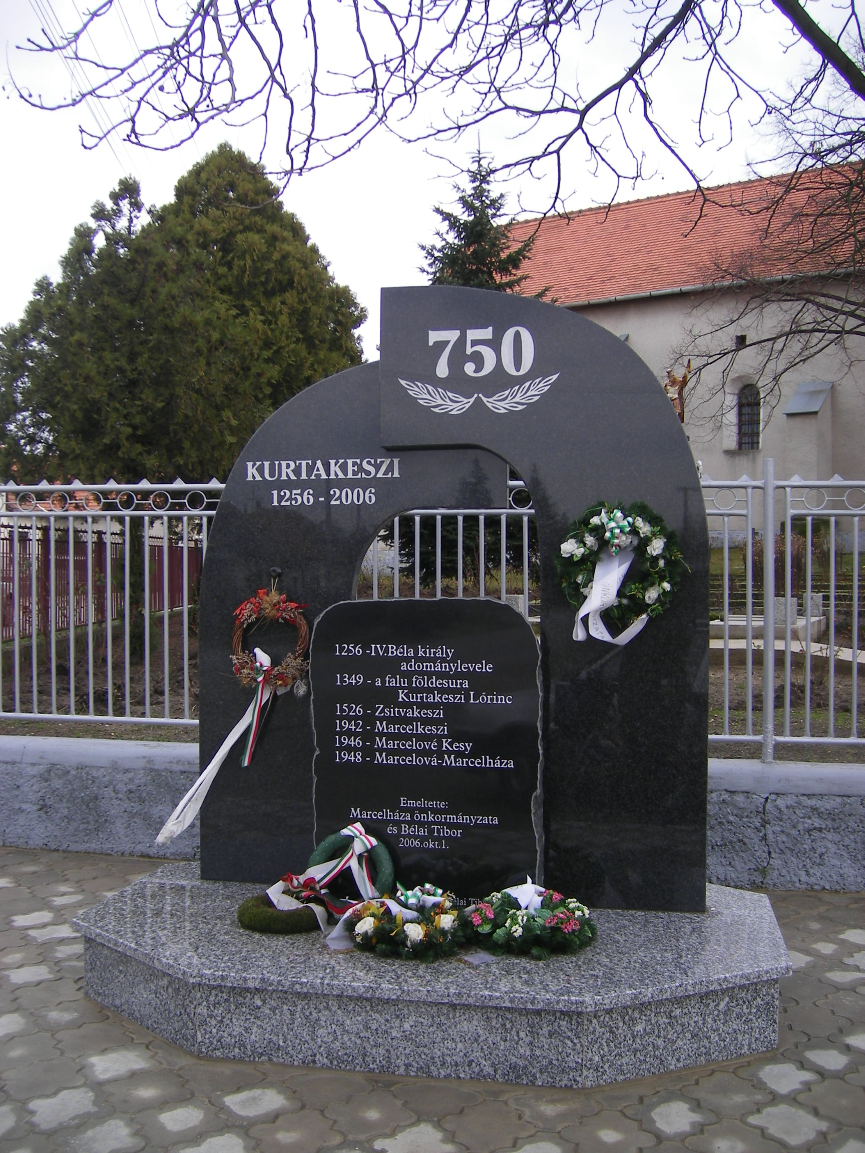 Marcelháza - a 750 éves Kurtakeszi emlékműve a katolikus templom mellett